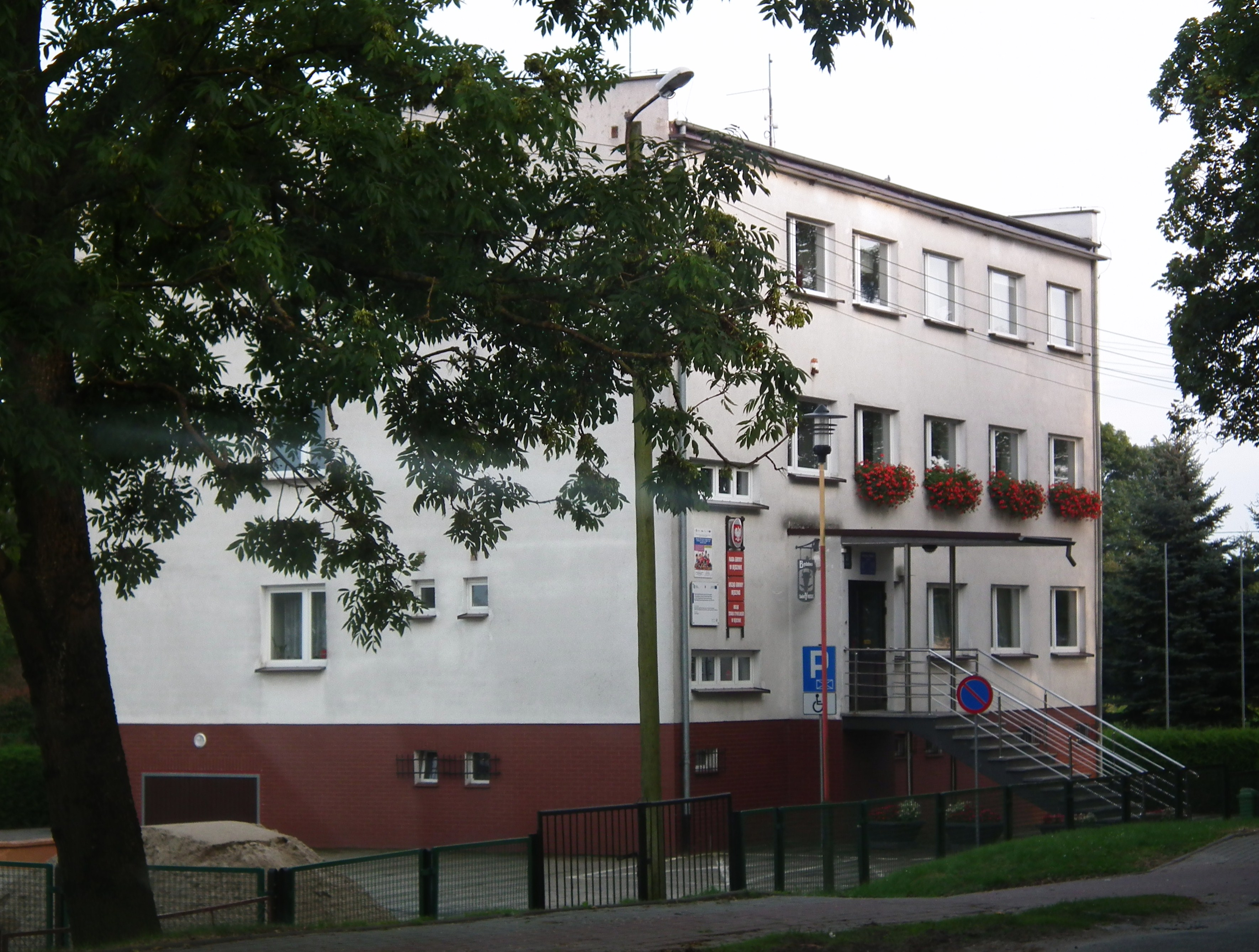 Budynek UG w Będzinie.